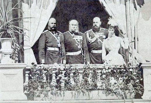 Auf dem Dreikaisertreffen in Skierniewice am 17.September 1884 bestätigten Franz Josef I von Österreich-Ungarn, Wilhelm I von Deutschland und Alexander III von Russland die Verlängerung des Dreikaiserbundes von 1881. Auf dem Foto stehen sie in dieser Reihenfolge von links nach rechts auf einem Balkon. Rechts neben ihnen steht die Gemahlin der Zaren Alexander III. Maria Fjodorowna.